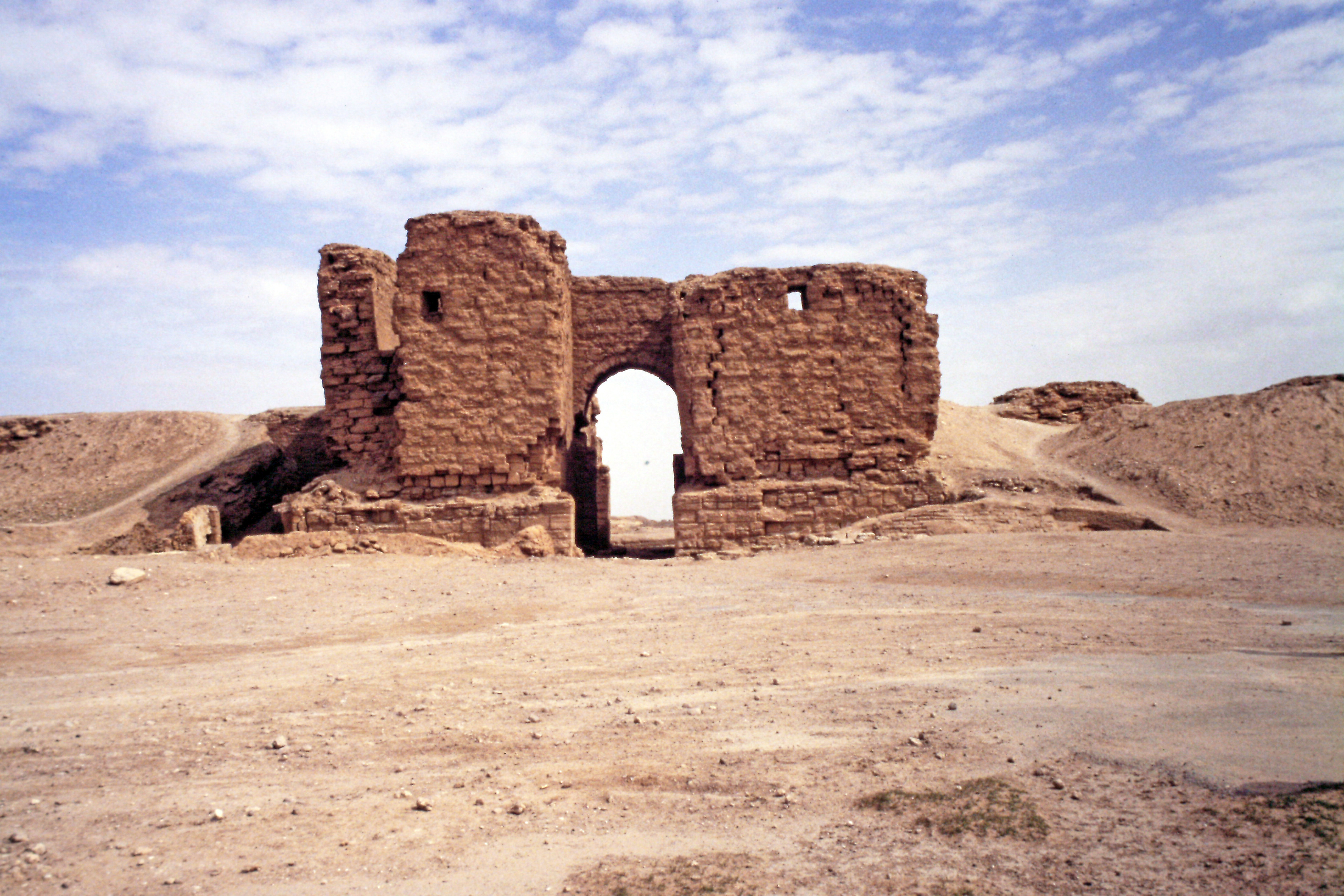 Fortezza